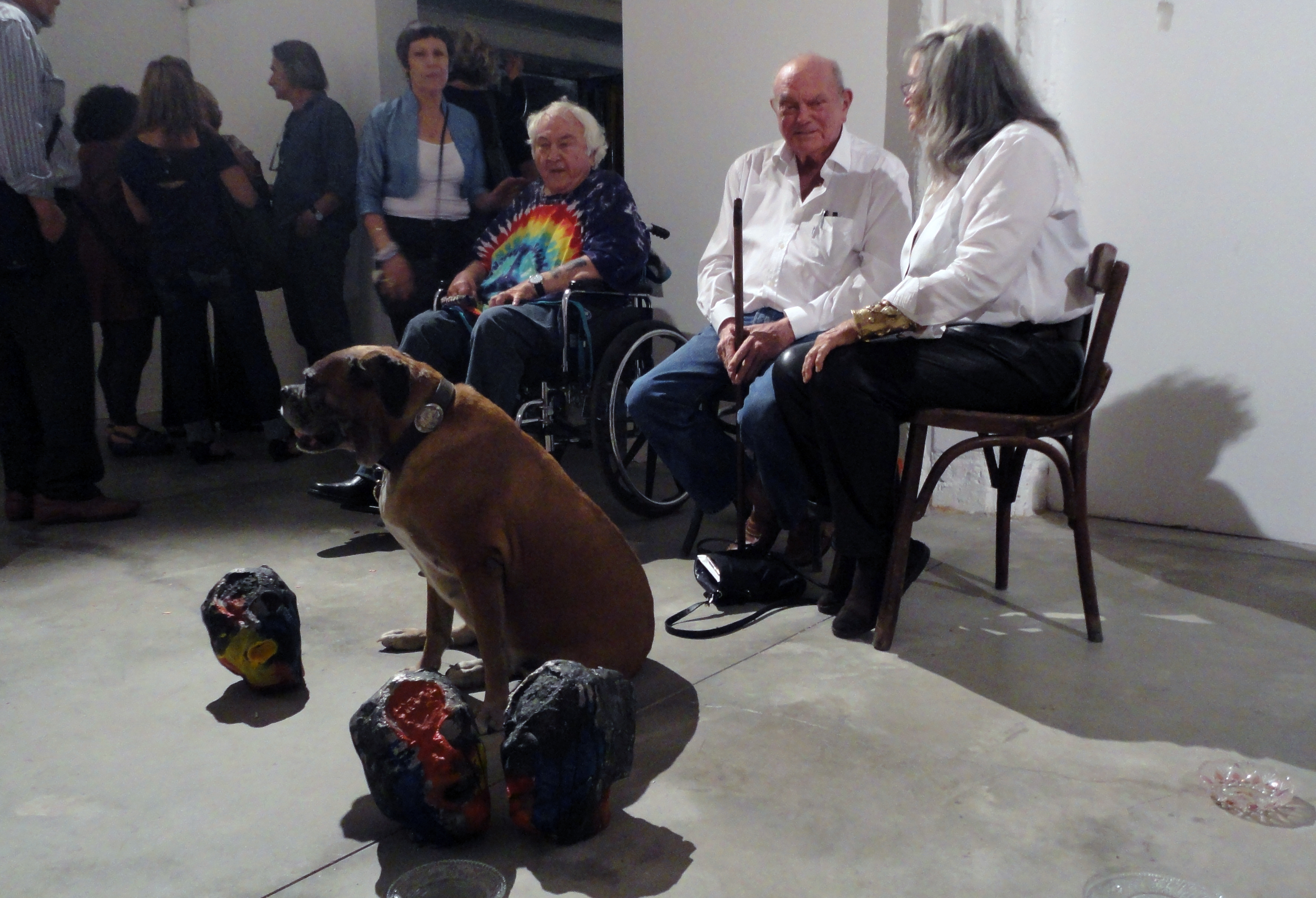 פתיחת התערוכה "Zbib El-Ard" של יגאל תומרקין וסיגלית לנדאו בגלריה הראל, תל אביב-יפו